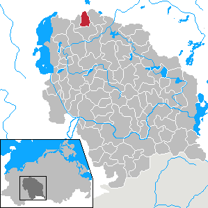 Zahrensdorf in Mecklenburg-Vorpommern - District Parchim